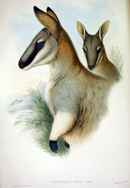 Macropus greyi (orig. Halmaturus greyi)